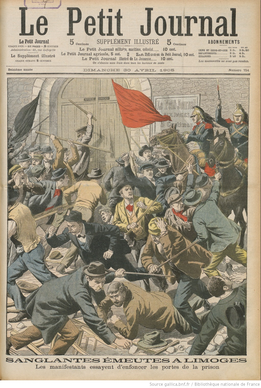 Le Petit Journal, supplément du dimanche 30 avril 1905